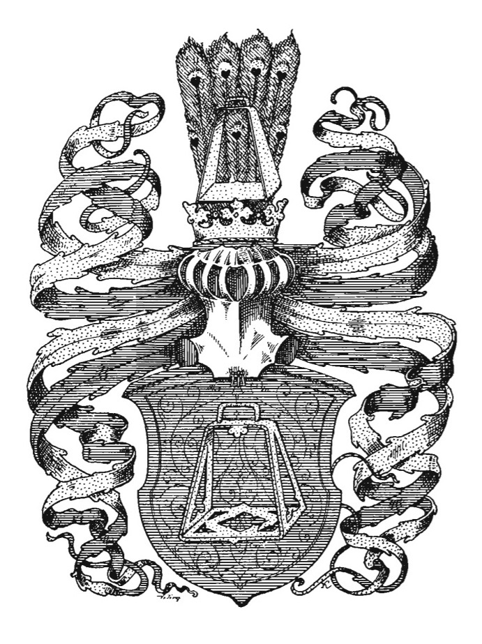 Erb Rašínů z Rýzmberka